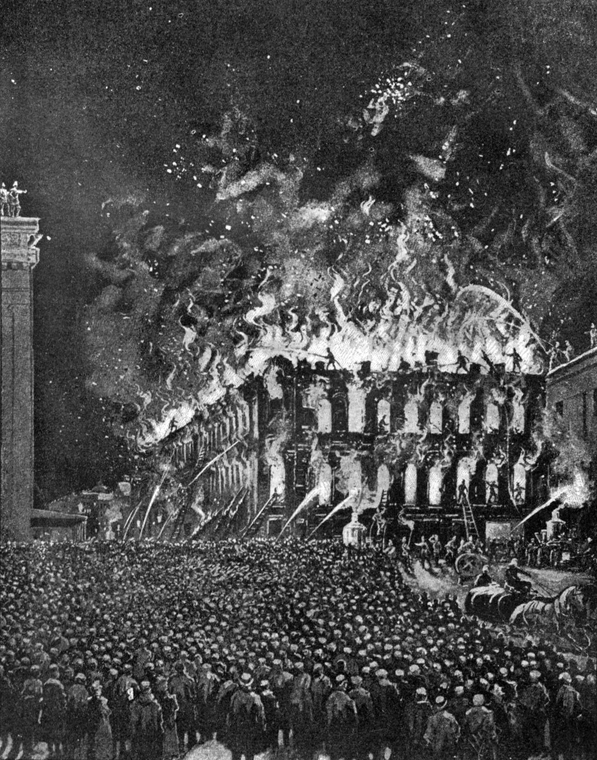 Пожар дома Мюр и Мерилиз на Театральной площади в ноябре 1900 года